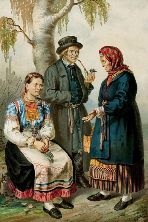 Ингерманланские крестьяне. Савакоты и Эурямёйсет.